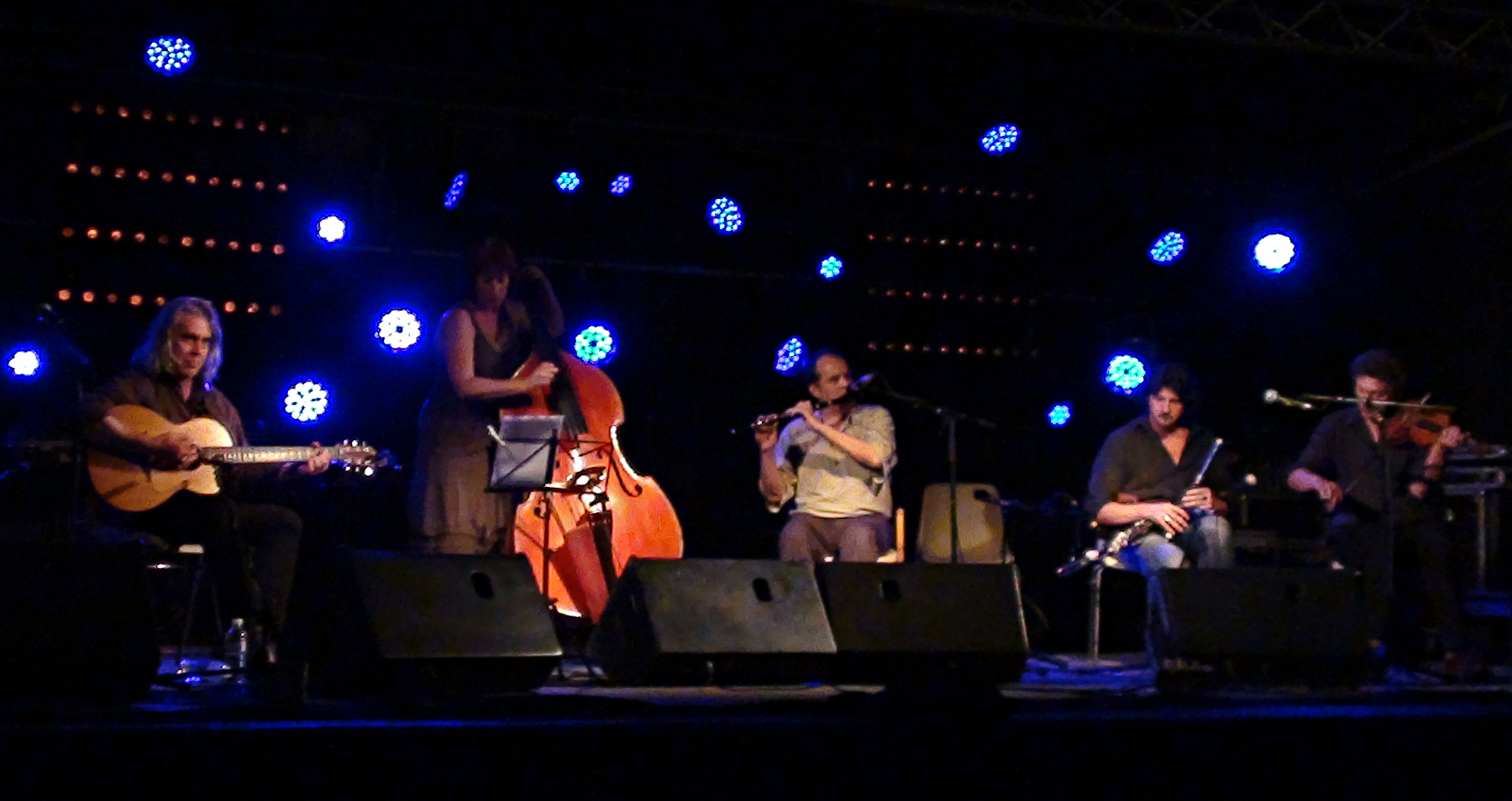 Pennoù Skoulm à Roscoff (Finistère, Bretagne) le 18 août 2012.